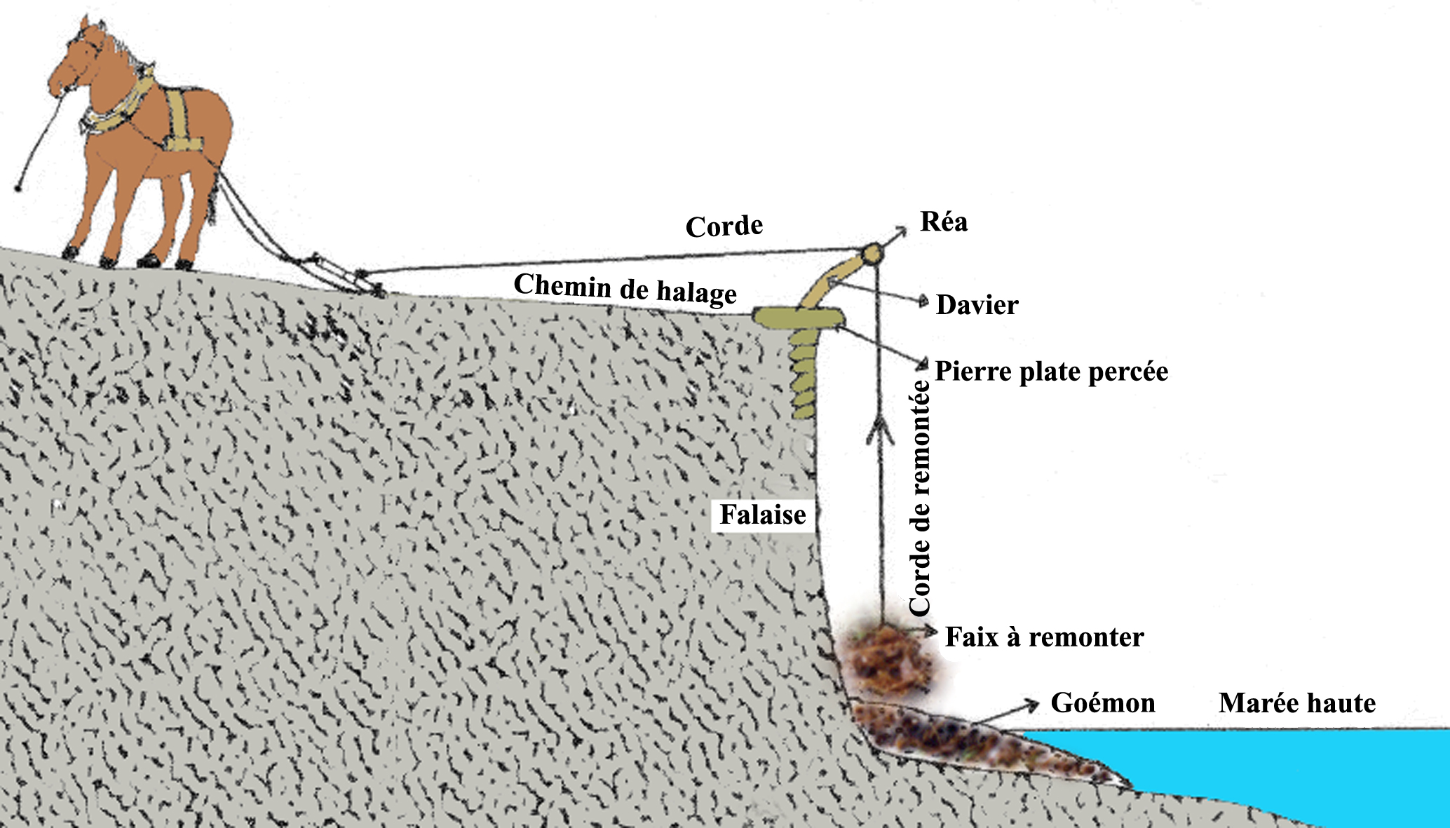 Eléments constitutifs de la remontée du goémon